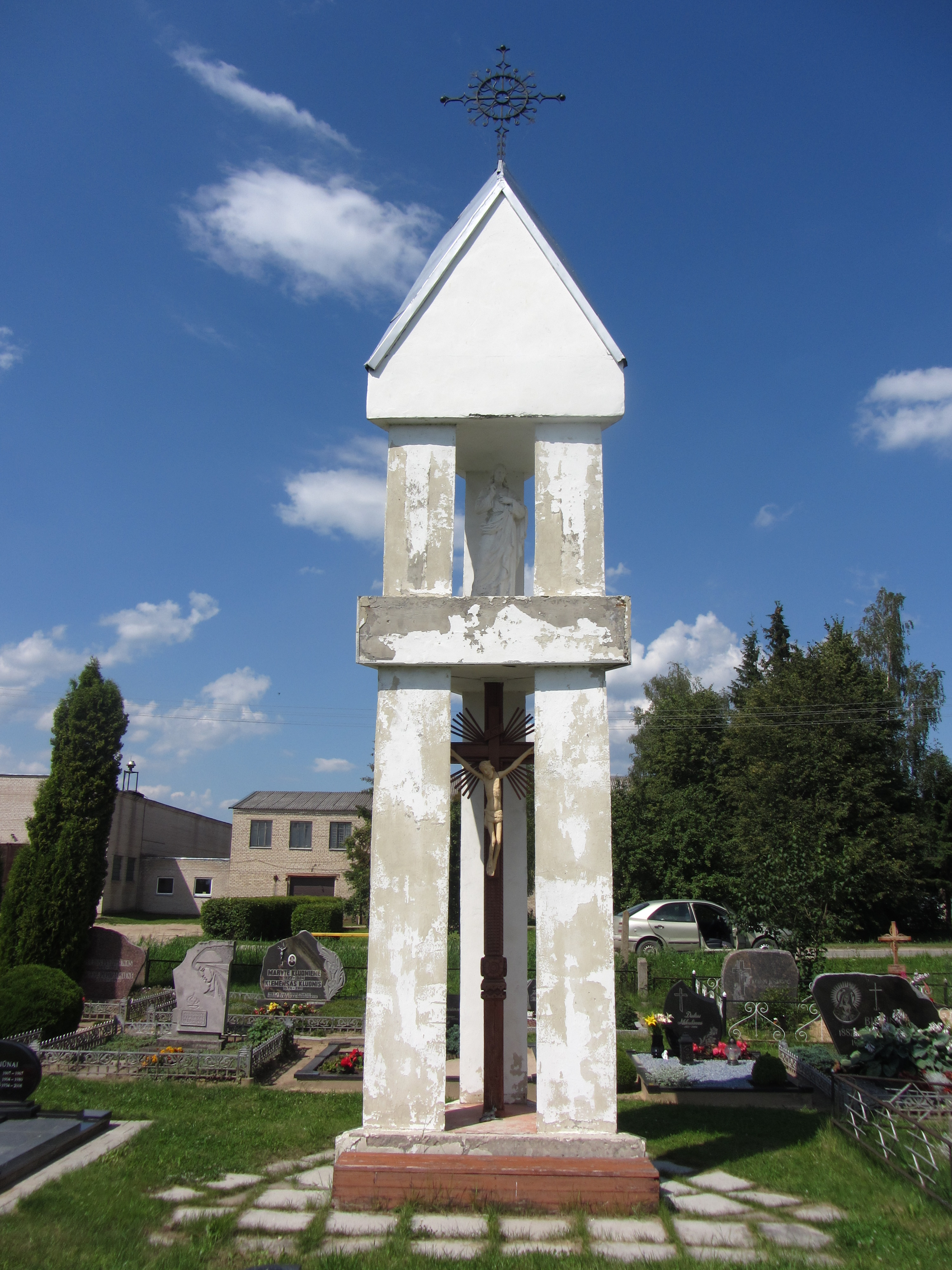 Navikai, Lithuania